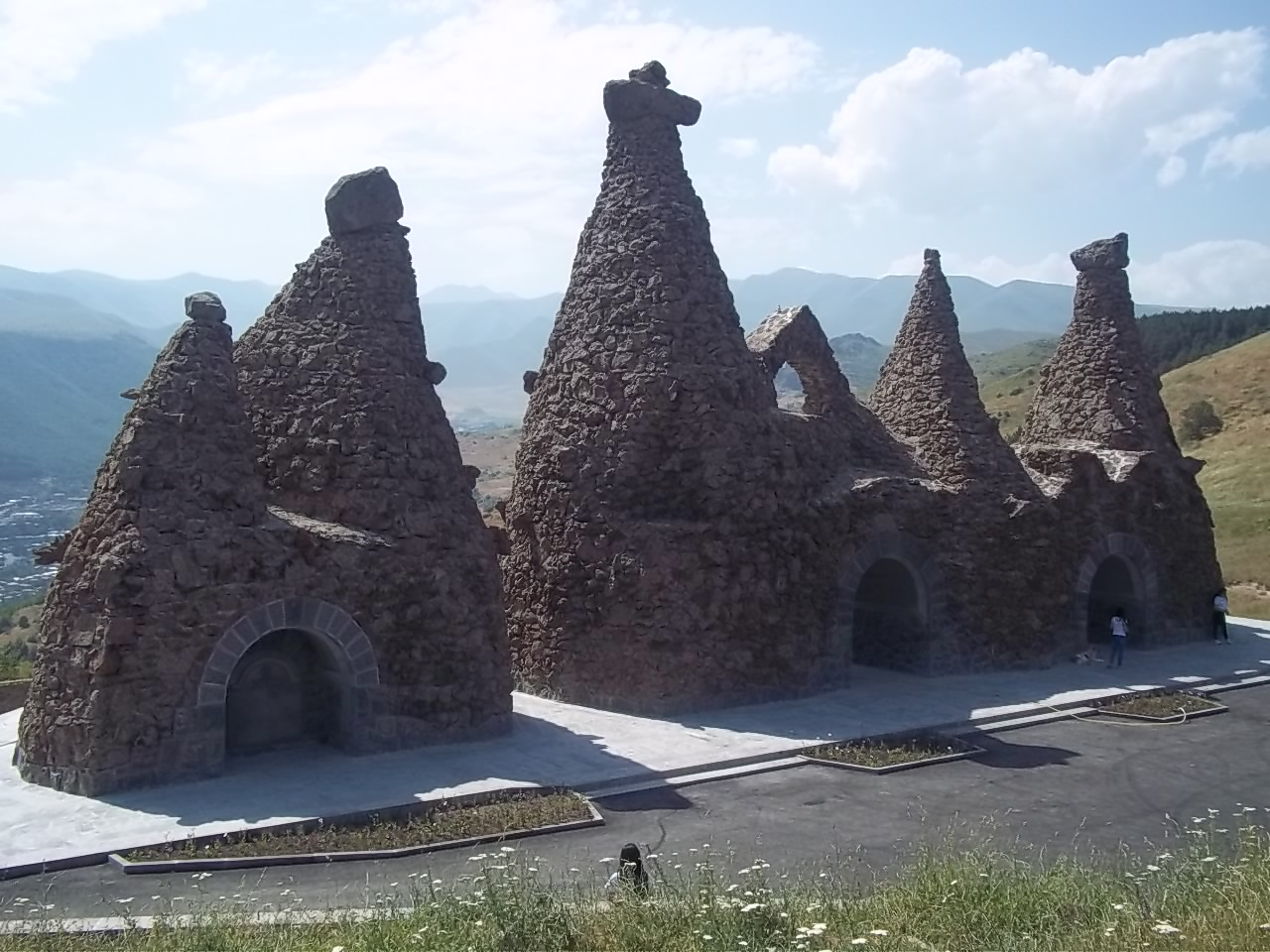 Գորիսի Զանգեր